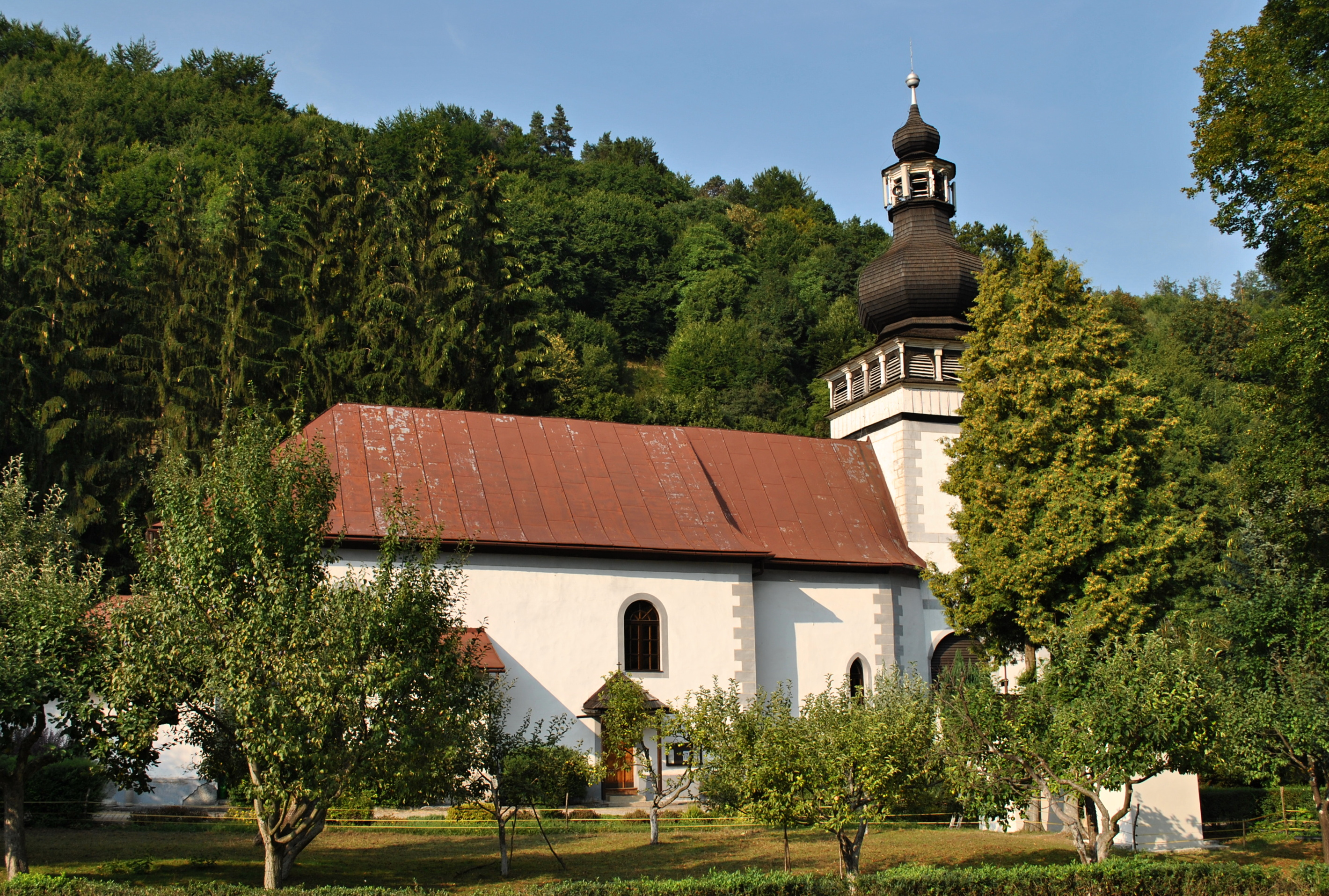 Kostol